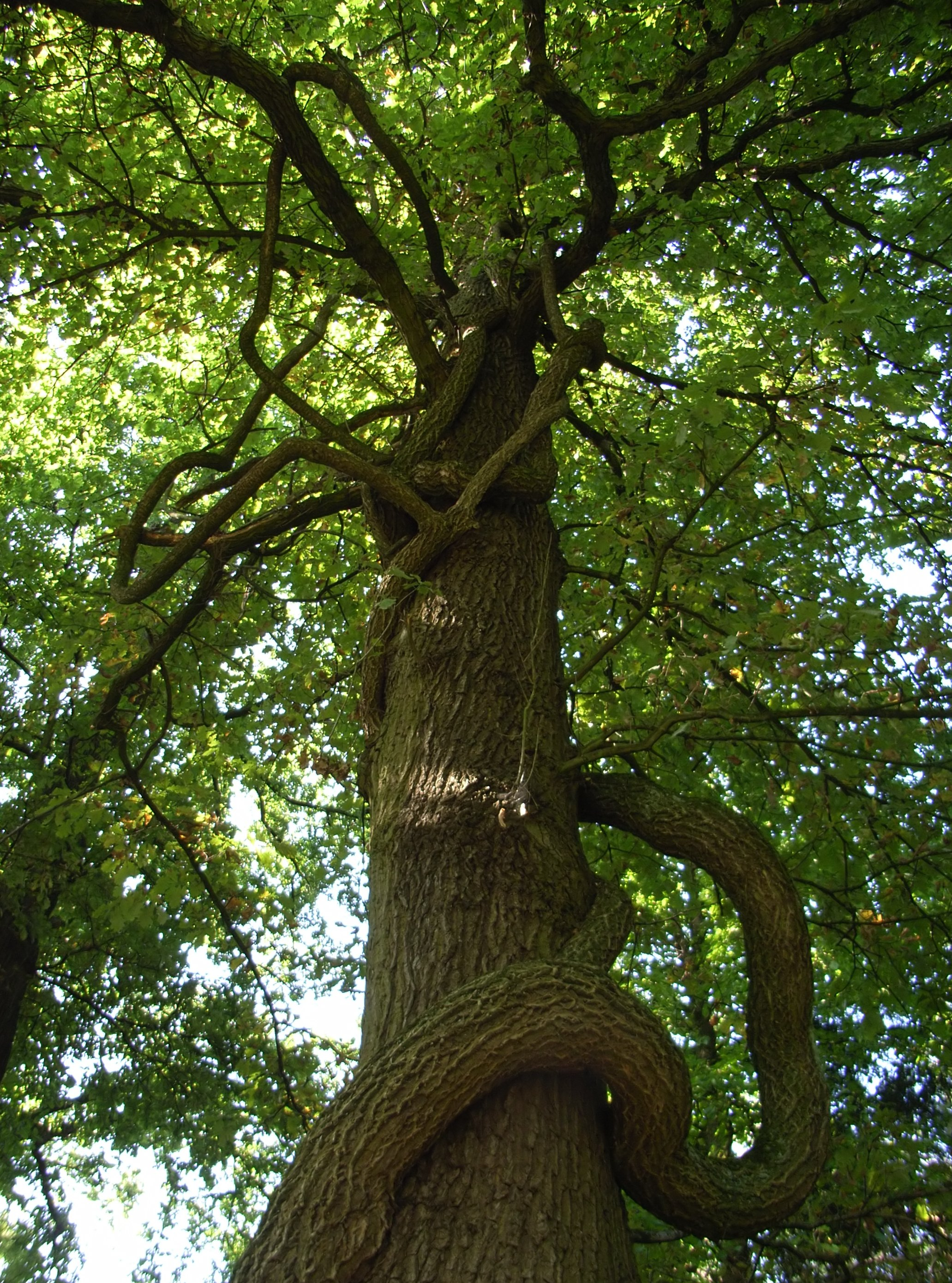 Celastus orbiculatus